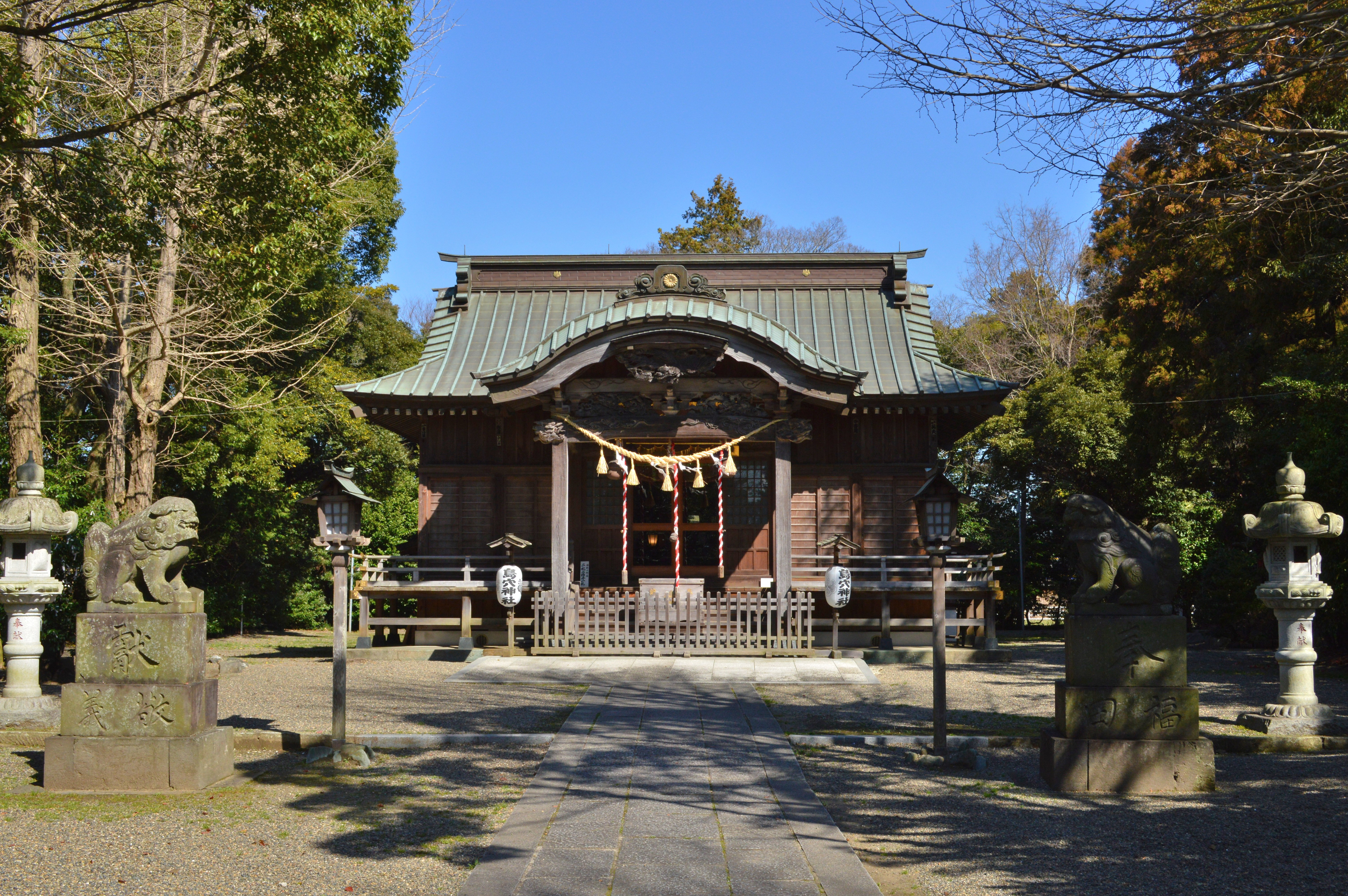 島穴神社 拝殿